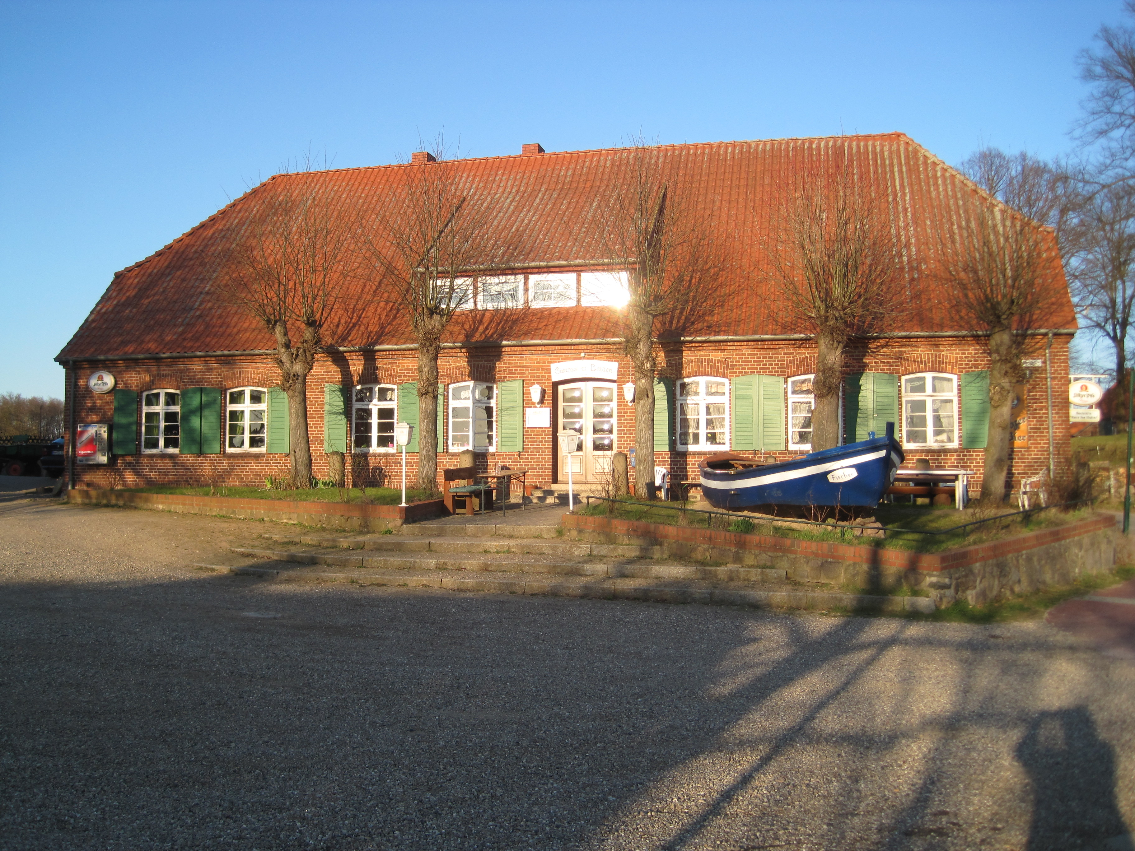 Dorfkrug am Dorfplatz 1 in Börzow/Meckl.